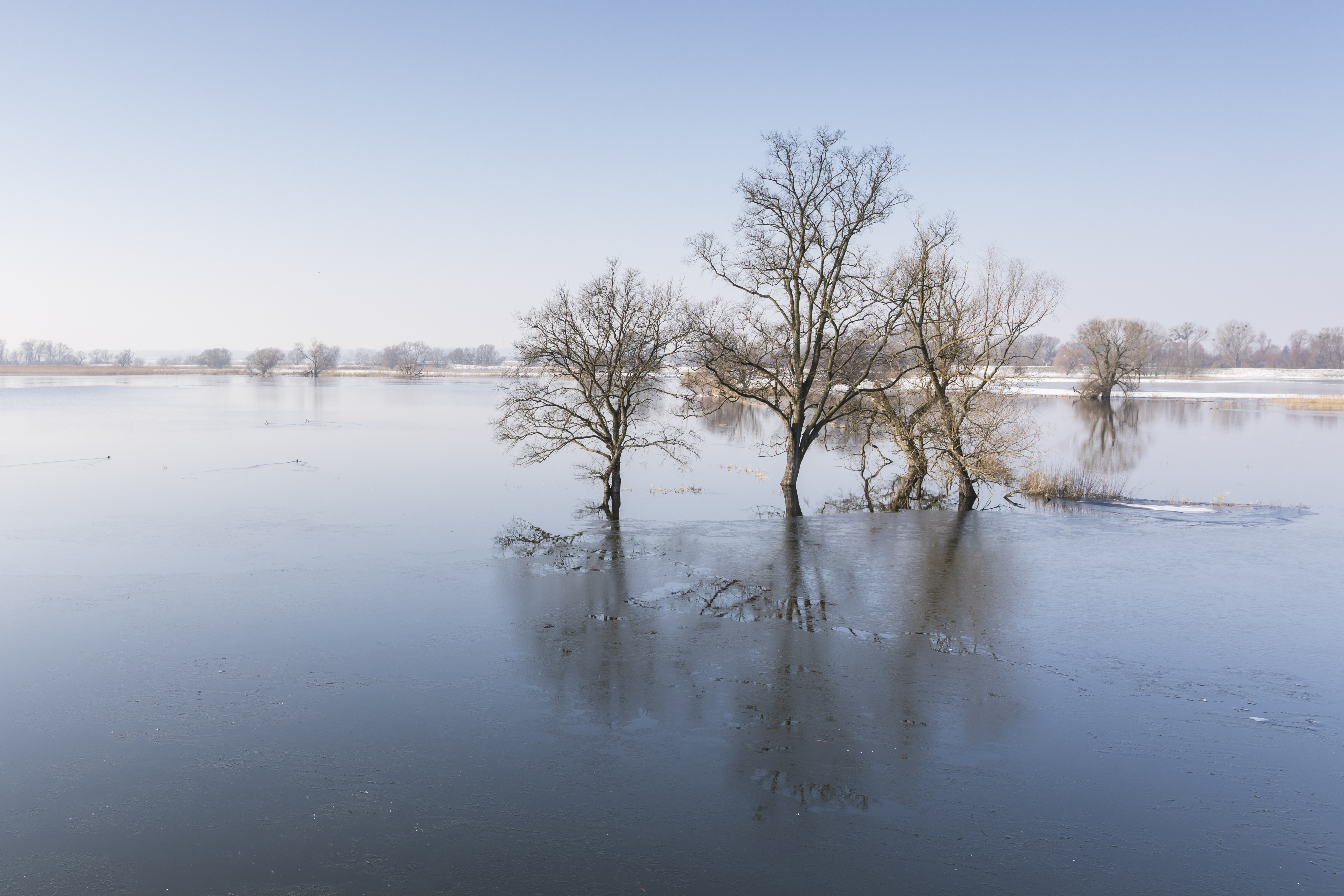 Im Winter sind diese Polder geflutet, der Fluss hat Platz sich auszubreiten. Im Sommer werden die Polder als Wiesen genutzt.